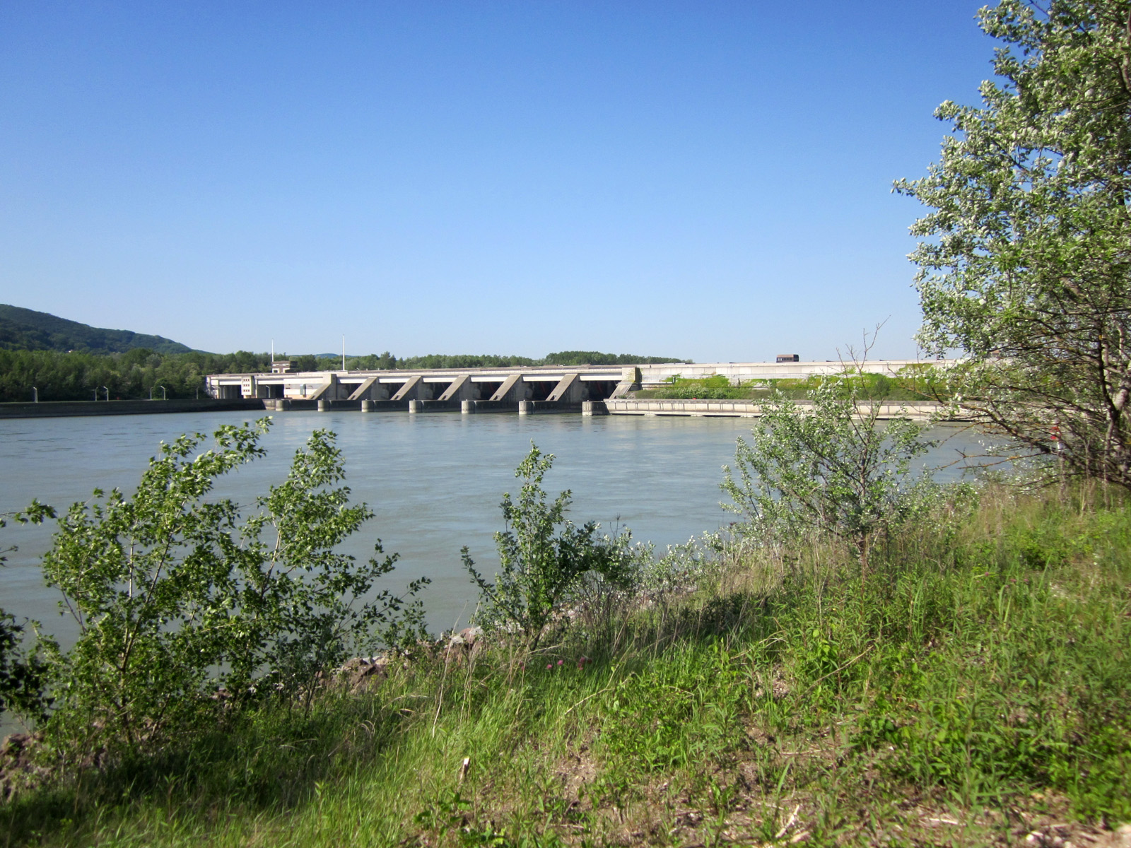 Greifenstein (Niederösterreich). Hydroelectric dam.